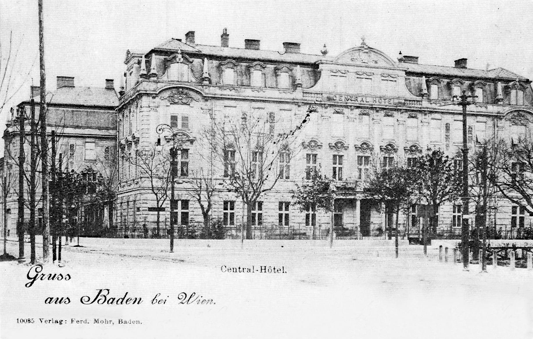 Central-Hotel (abgebrandt 1945), Conrad-von-Hötzendorfplatz 6, Baden bei Wien